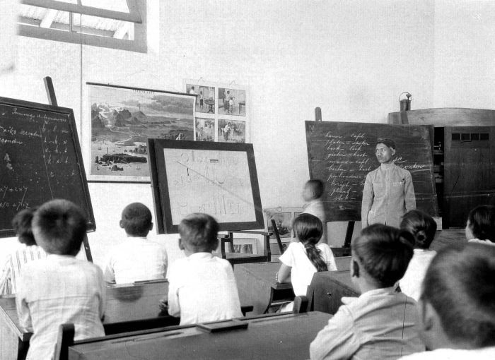 Negatief. Spreekles in de eerste klas van de Schakelschool te Poerworedjo, Midden-Java